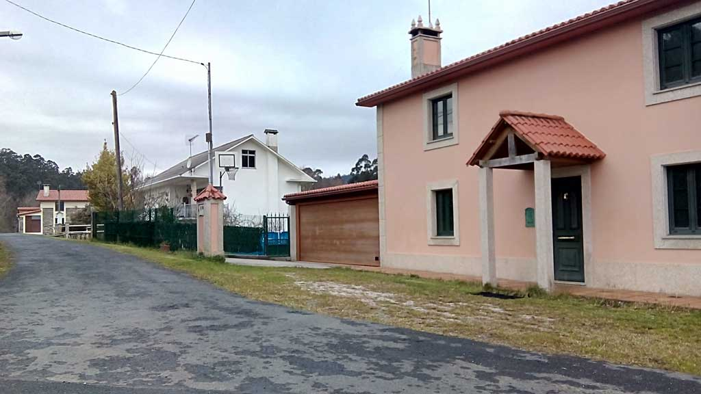 Vista do Castro, Pedroso, Narón.